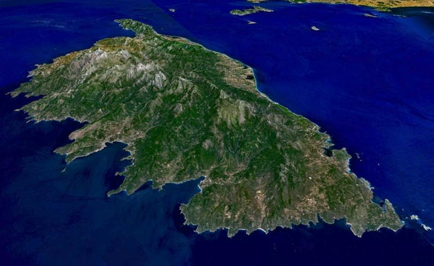 Corsica